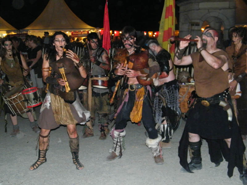 Lurte in 2011.